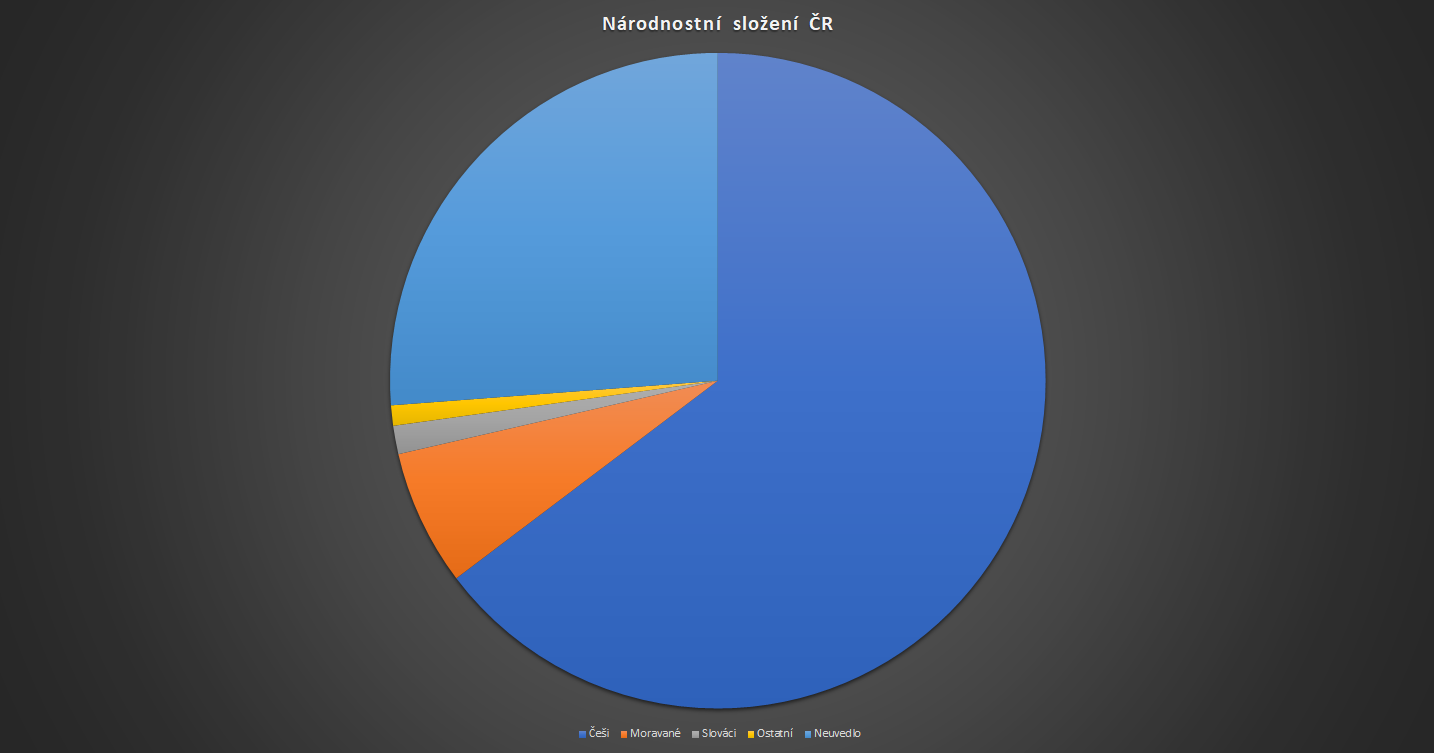 Národnostní složení České republiky.